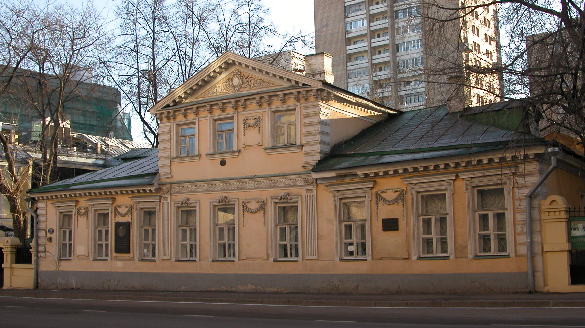 Москва, переулок Сивцев Вражек, дом 27. Дом-музей А. И. Герцена.